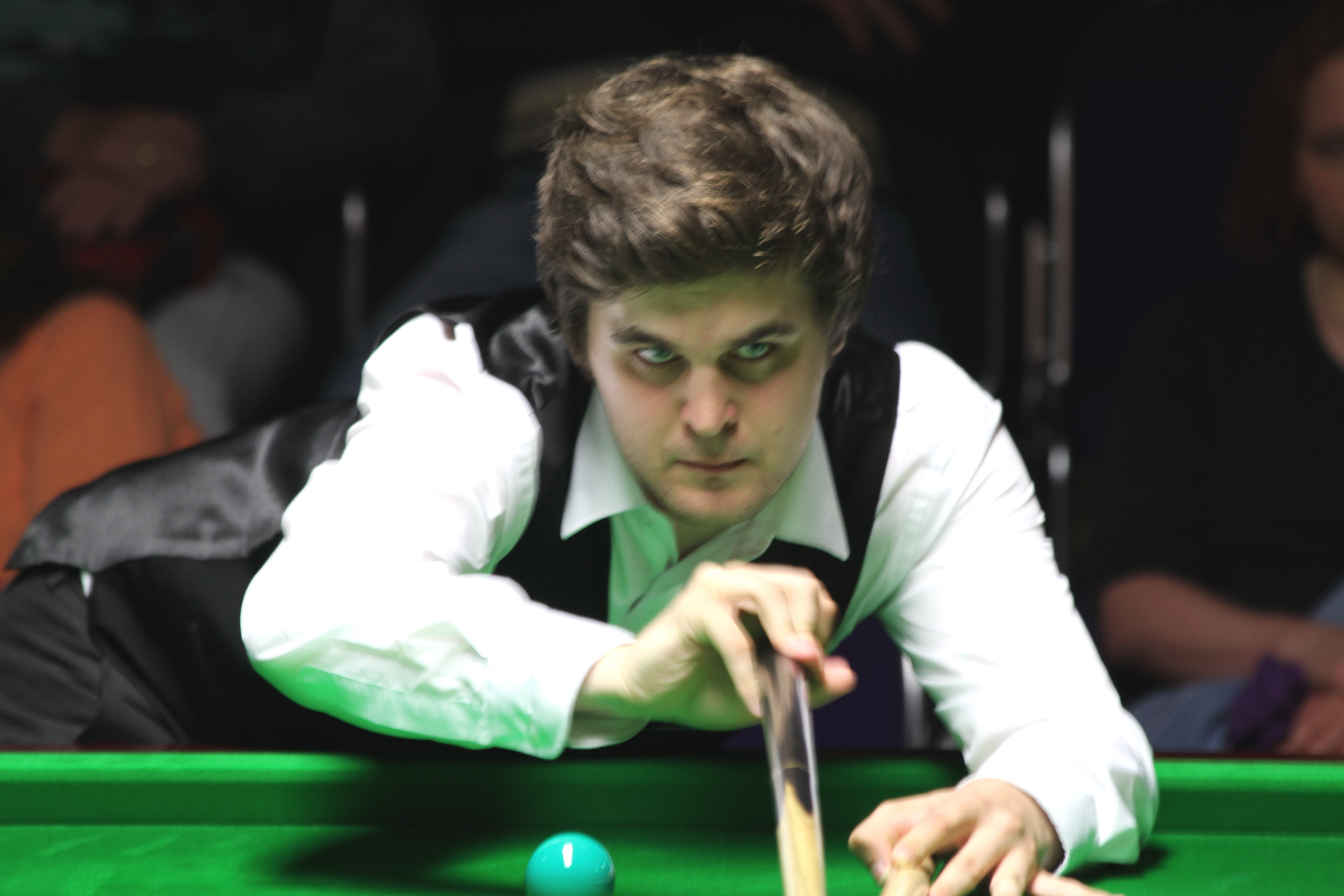 Sydney Wilson beim Paul Hunter Classic 2013